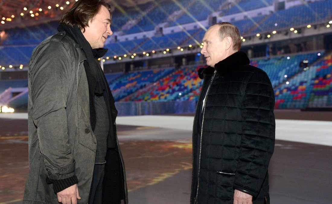 Владимир Путин и Константин Эрнст